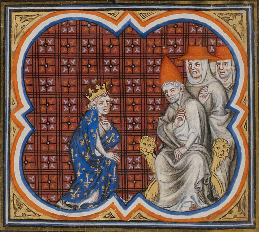 Ludvík VI. Francouzský a Kalixtus II.